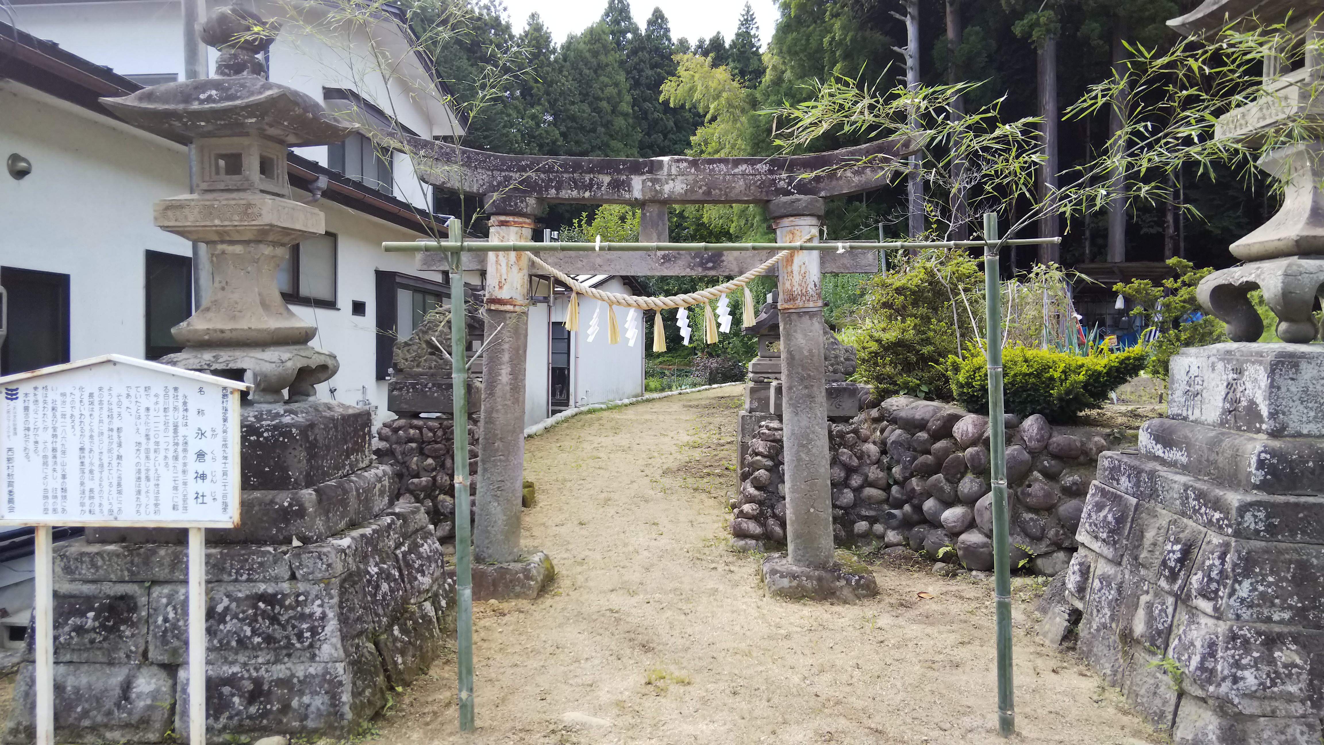 永倉神社鳥居